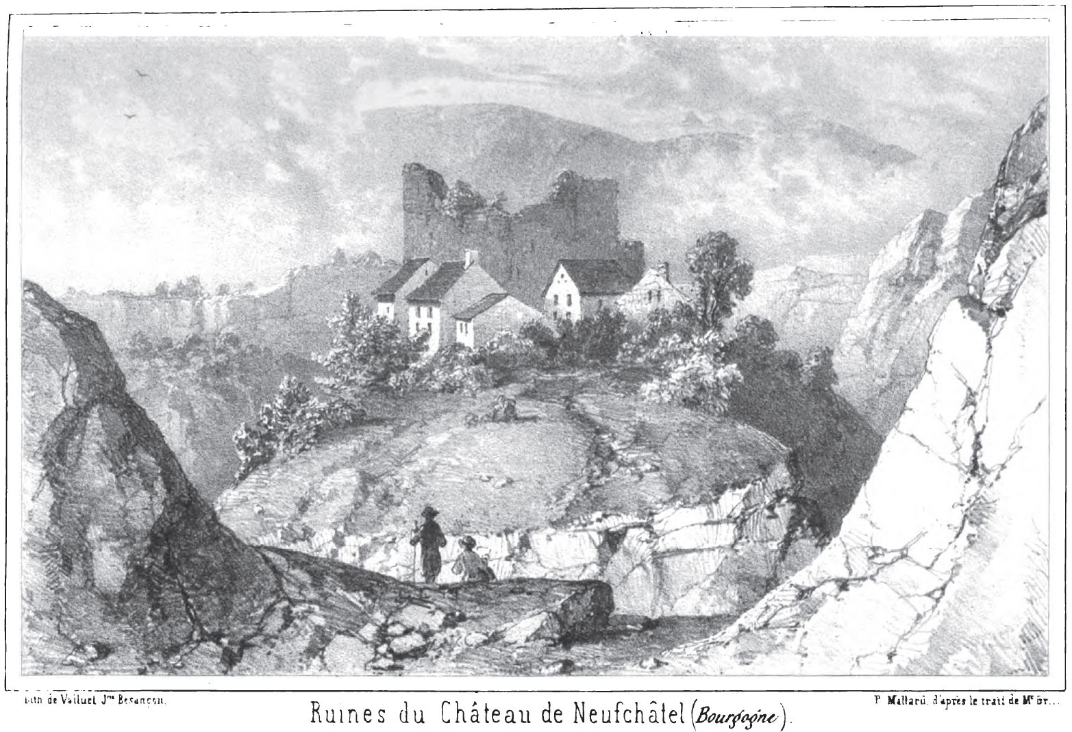 Gravure de Neuchâtel-Urtière et des ruines de son château